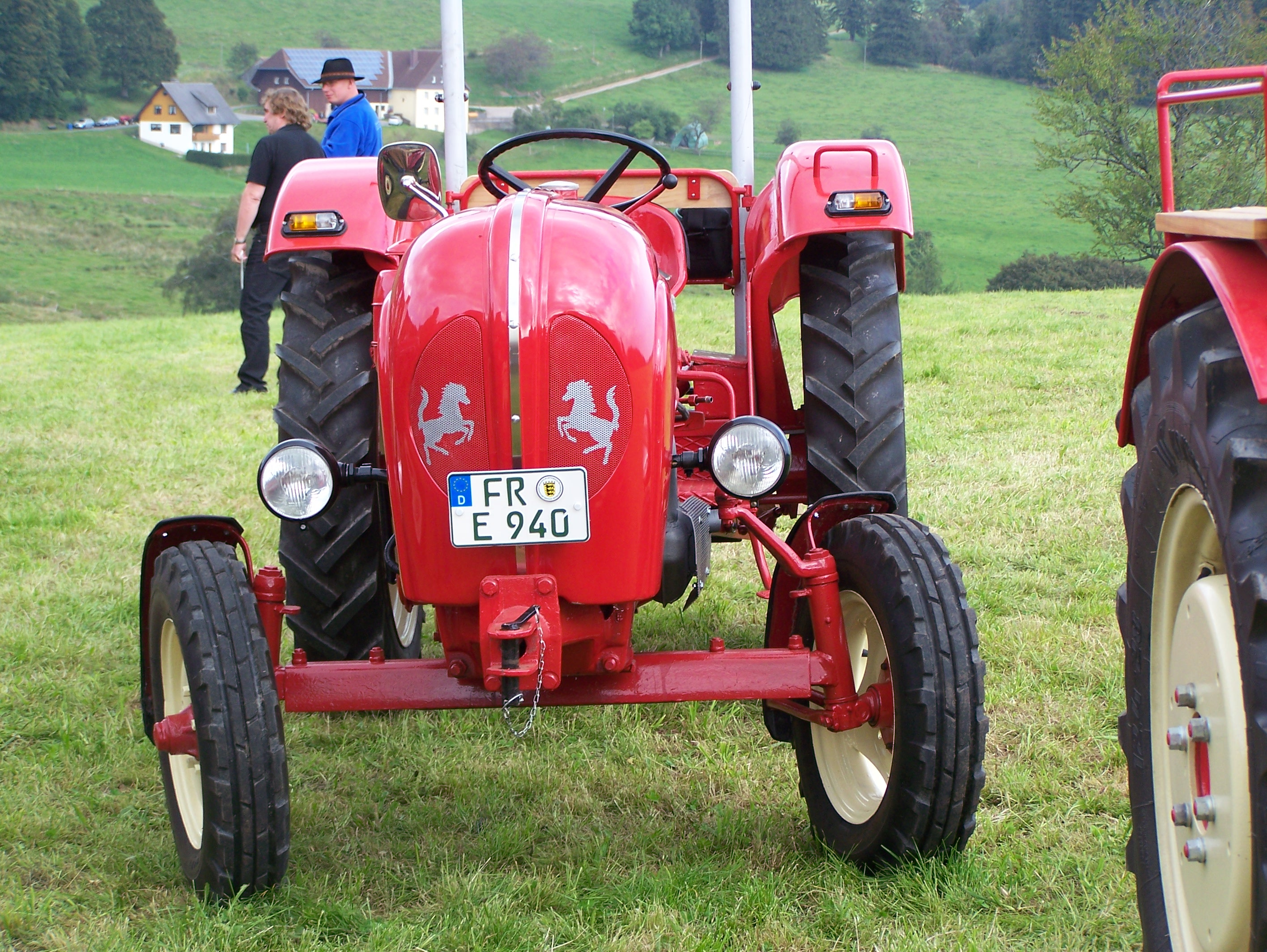 Porsche-Diesel-Traktor aufgenommen beim Porsche-Oldtimer-Treffen in Saig, Lenzkirch, Baden-Wüttemberg, Deutschland